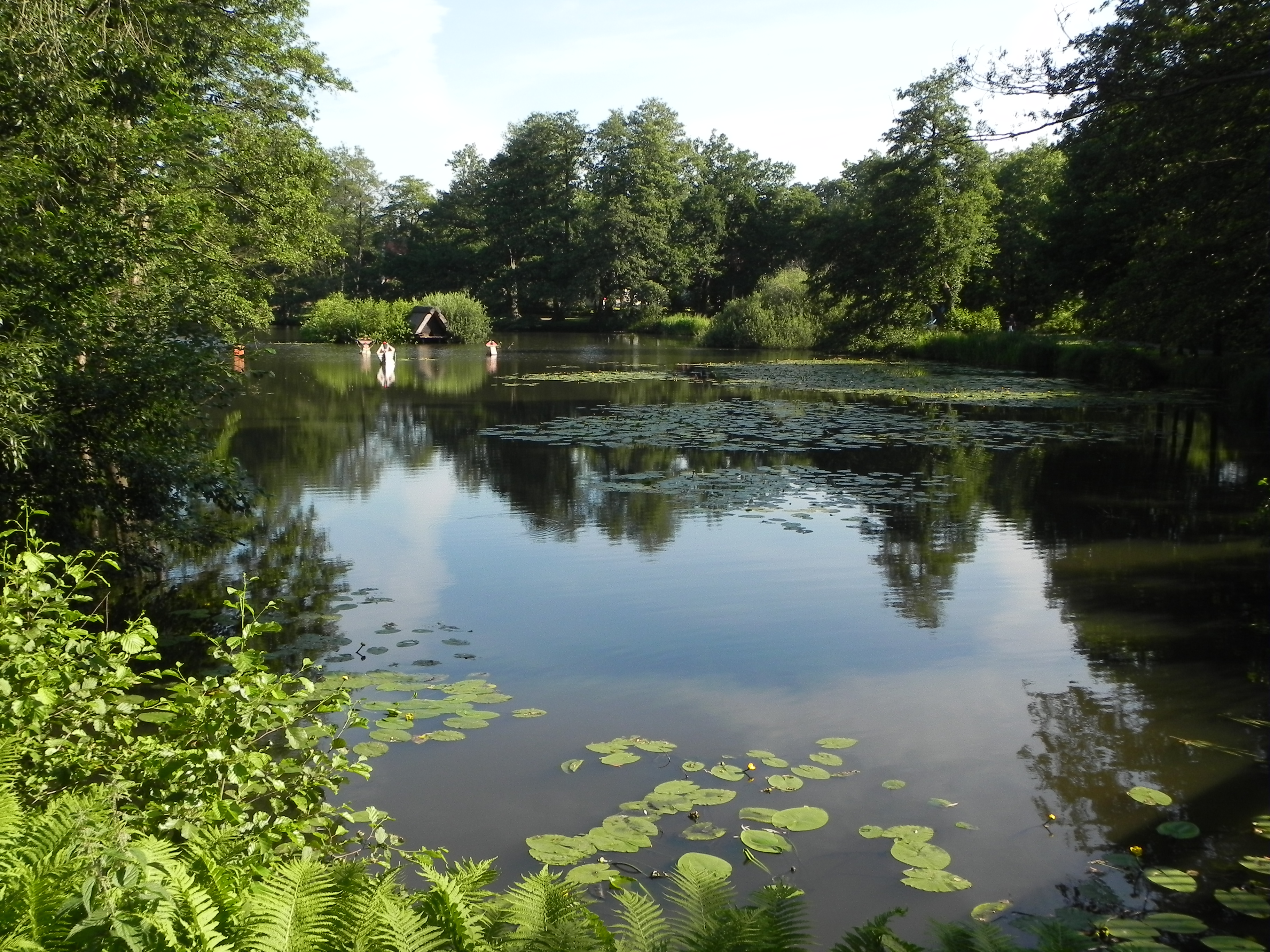 Mühlenteich in Munster (Örtze), Niedersachsen, Germany